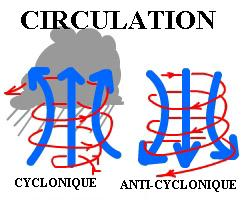 Mouvement de l'air autour et dans les dépressions et les anticyclones